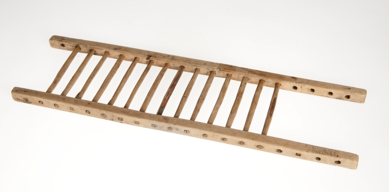 Ostegrind av bjørk fra Melhus i Sør-Trøndelag. Lengde 66.5 cm